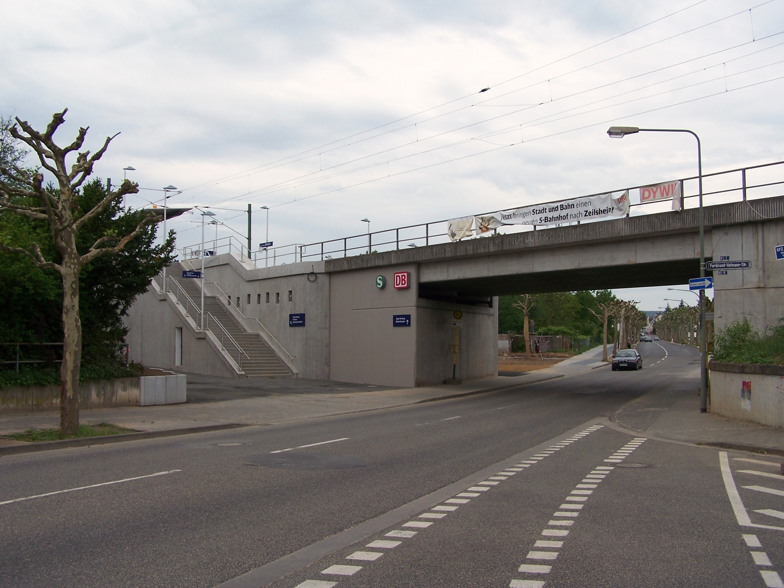 Straßendurchbruch der Sindlinger Bahnstraße / West-Höchster Straße